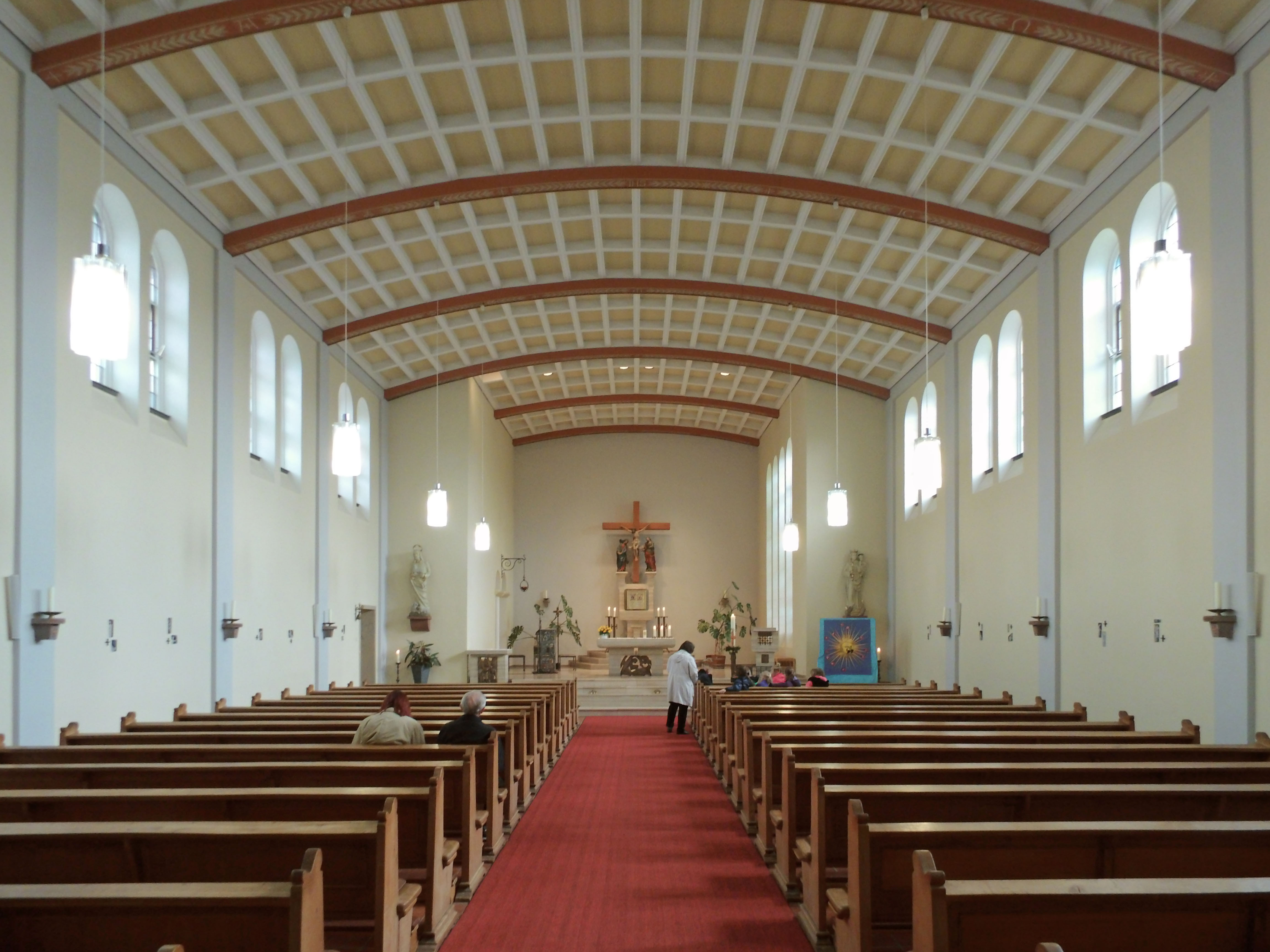 Römisch-katholische St.-Gabriel-Kirche in Salzgitter-Gebhardshagen.